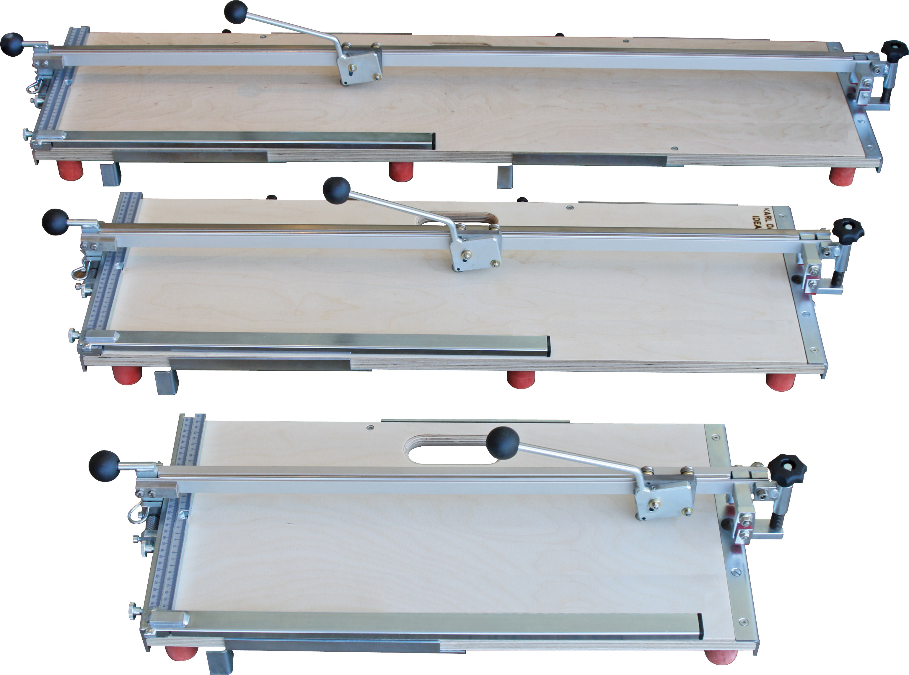 Fliesenschneider mit Führungsschiene in drei verschiedenen Größen